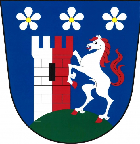 Střemošice, znak. V modrém štítě na zeleném návrší stojící stříbrný vzpřímený kůň s červenou zbrojí, opírající se o stříbrno-červeně polcenou kvádrovanou věž s černým oknem a cimbuřím, nad nimi tři stříbrné květy střemchy se zlatými středy vedle sebe.